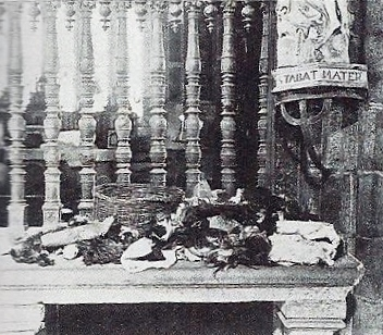 Saint-Herbot : queues de vaches déposées en guise d'offrandes sur l'autel (en 1907). Leur revente procurait au clergé un revenu non négligeable.